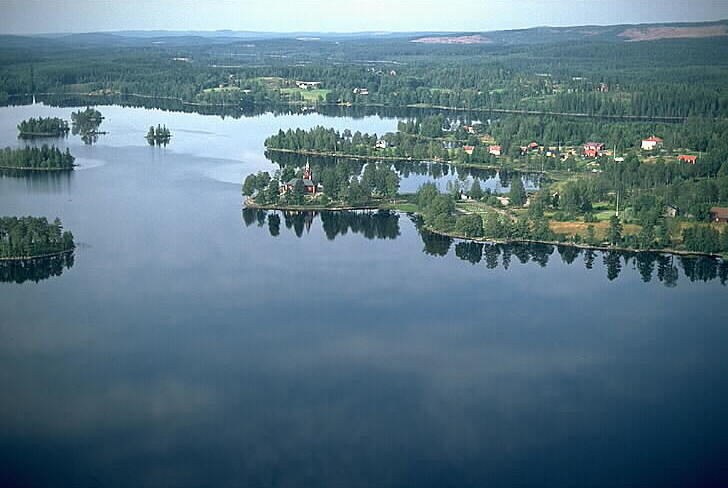 Rämmens kyrka i bildens mitt. Motiv: Rämmen Nyckelord: Flygbilder, Riksintressen Kategori: Insjömiljöer Rämmens kyrka i bildens mitt.